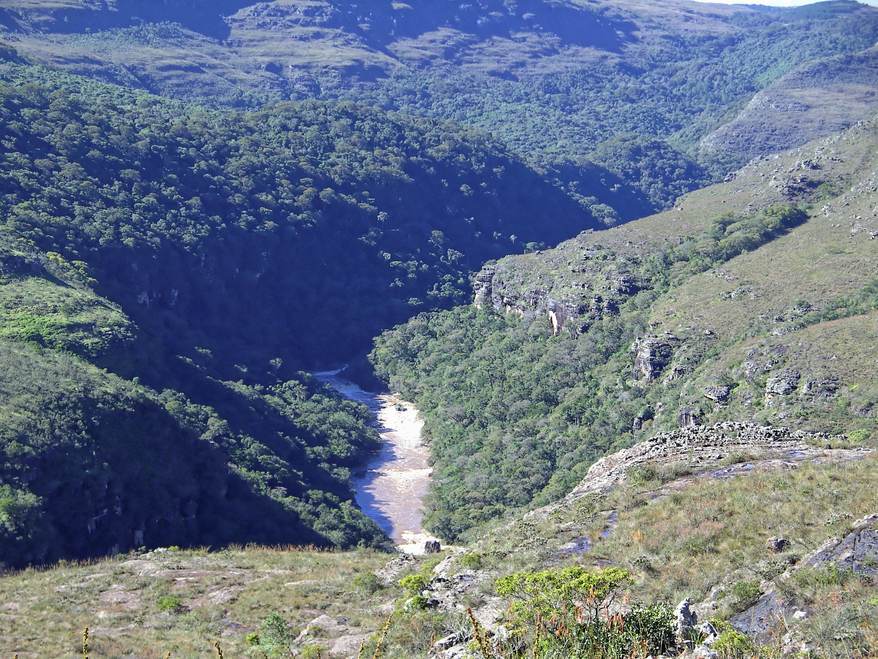 Esse é o Cânion Guartelá, o cânion do rio Iapó, no Parque Estadual do Guartelá, localizado entre os municípios de Tibagi e Castro, no Paraná. Na foto vê-se um trecho do rio Iapó, com suas corredeiras.